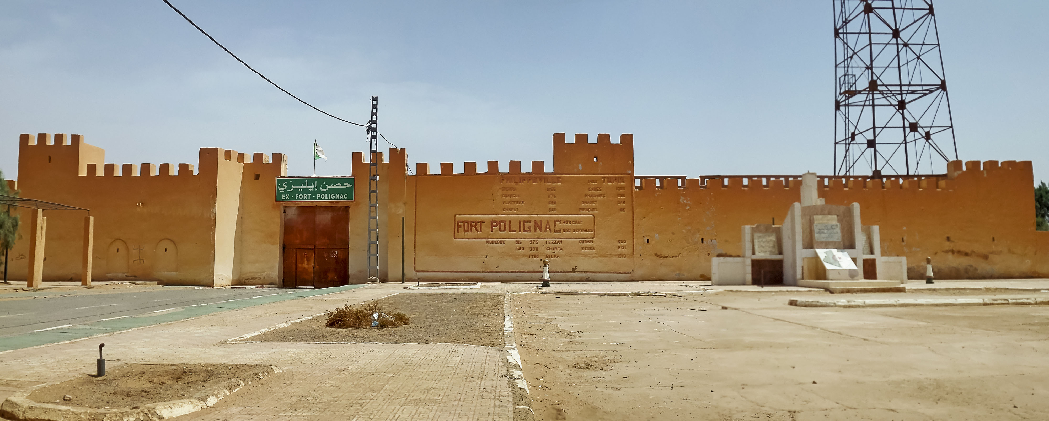 Fort Polignac حصن اليزي